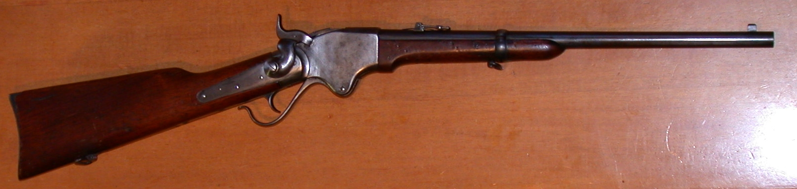 Spencer Carbine Mod 1865 .50 caliber